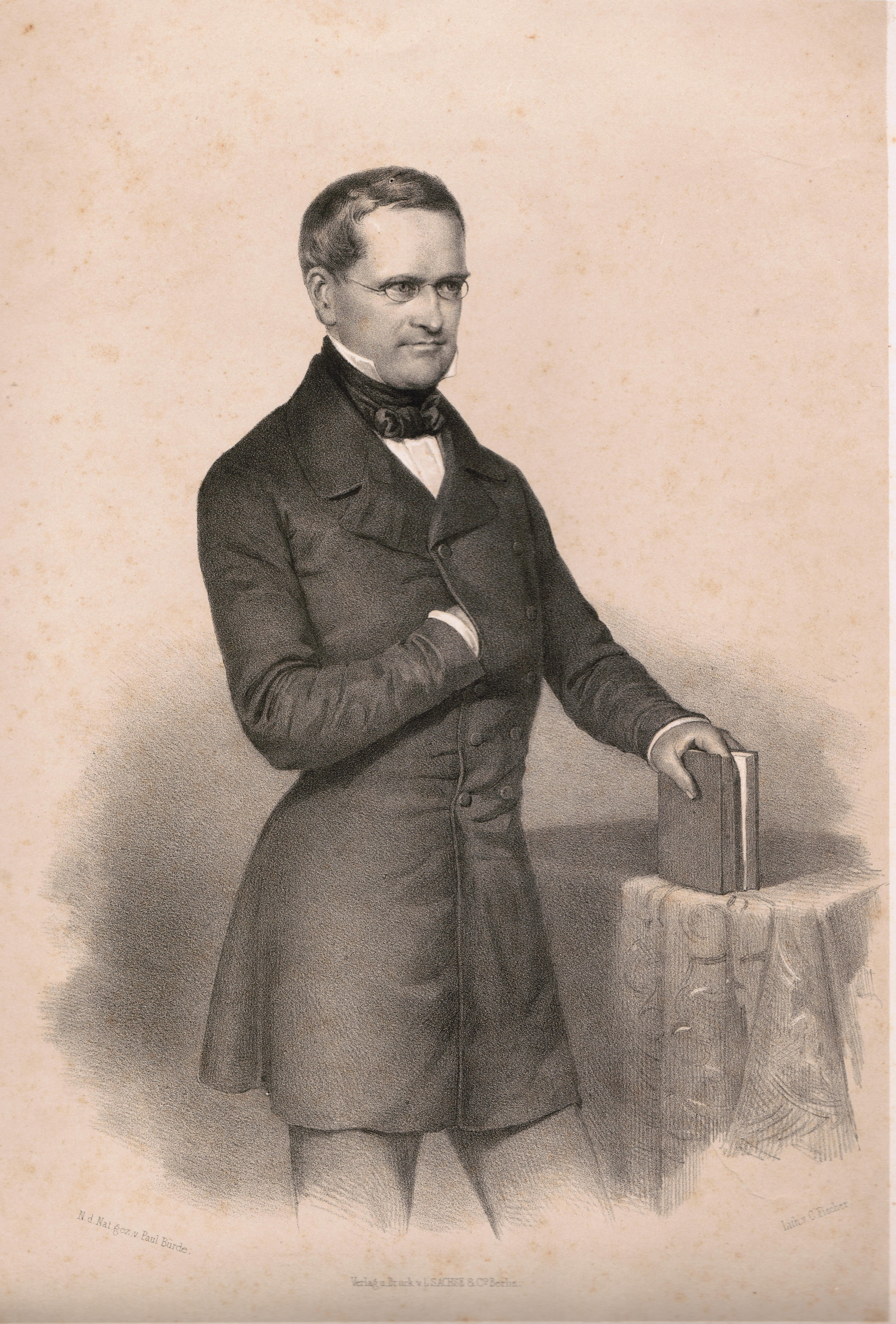 von Manteuffel, Minister des Inneren. Lithographie, vor 1851. (Blattgröße 36 x 50 cm, hier nur die Tonplatte 21 x 29 cm)